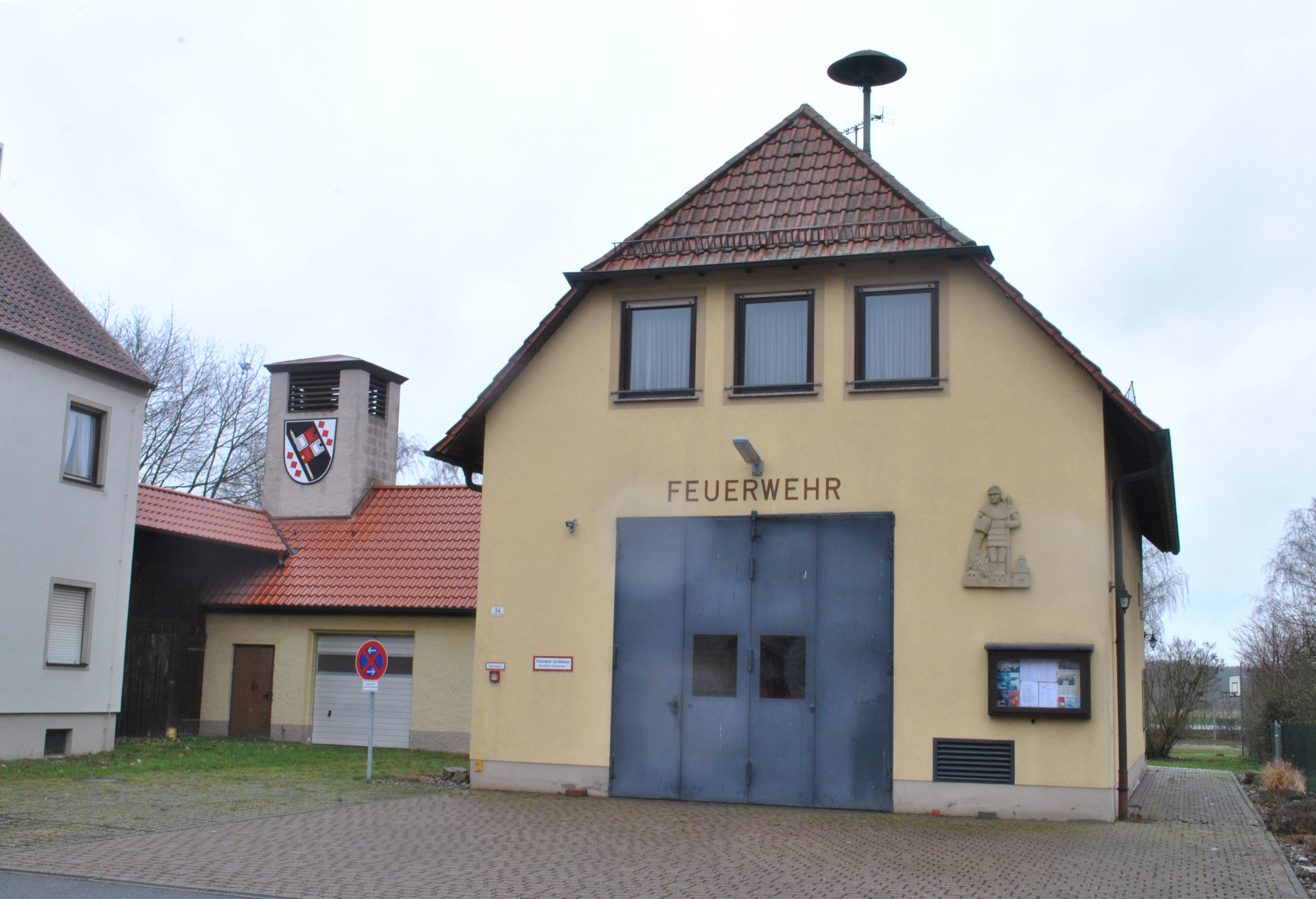 Feuerwehrhaus in Hörblach, Kitzinger Straße